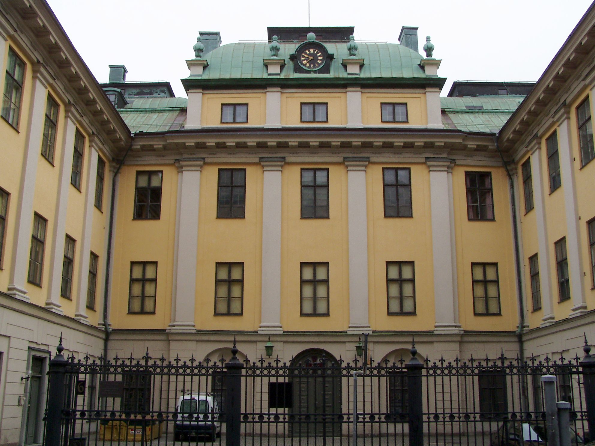 Bååtska palatset Blasieholmen Stockholm Sweden Freemasons 20050808